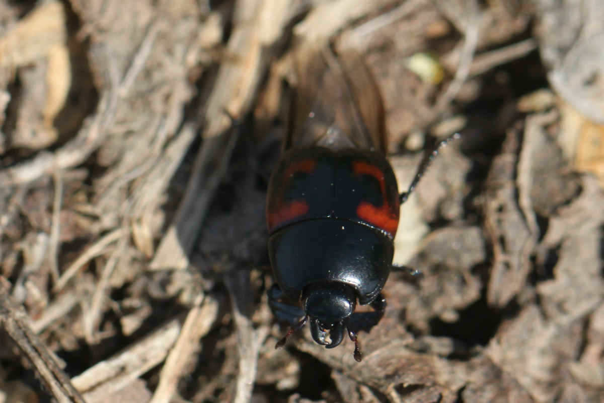 Vierfleck-Gaukler (Hister quadrimaculatus) kurz vor dem Abflug mit gespreizten Flügeln, am 10.4.2017 in Walldorf/Baden